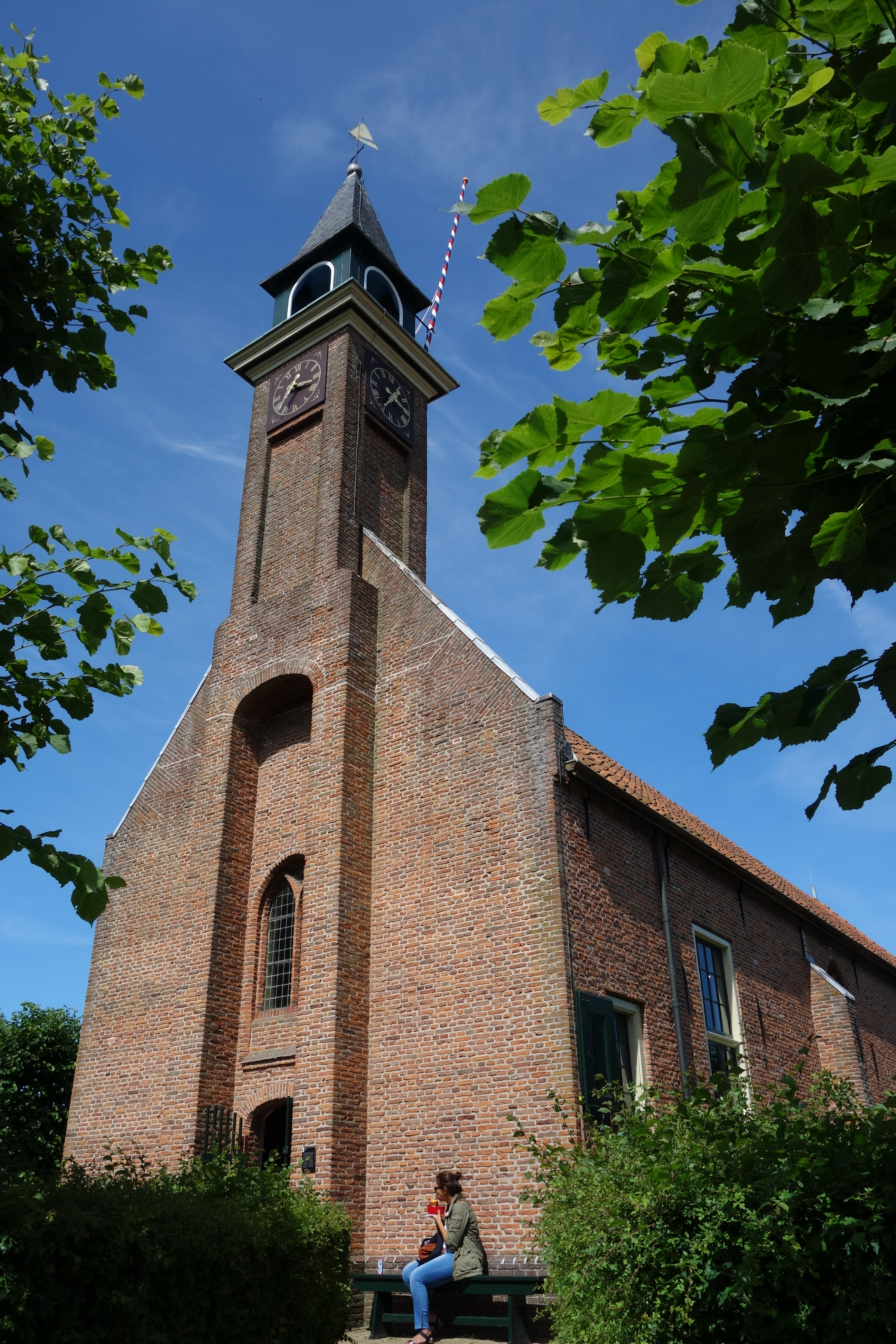 Voormalig kerkgebouw uit Den Oever. Kapel staat sinds 1968 in het Zuiderzeemuseum.